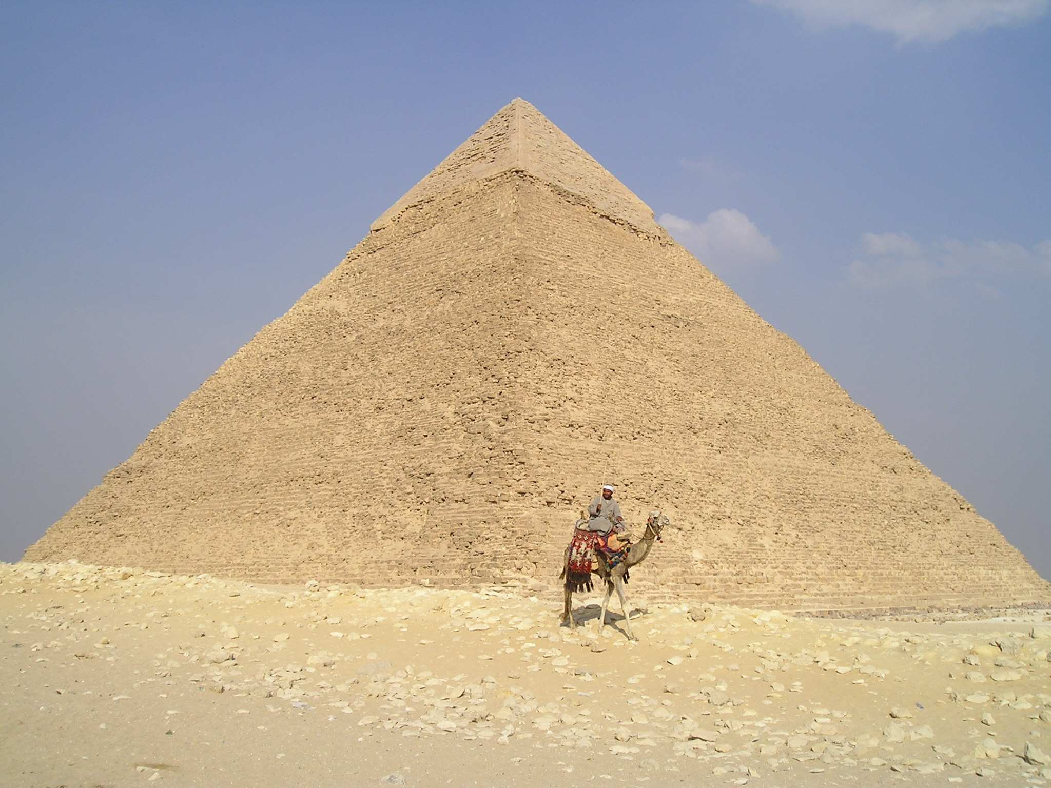 Khephren Pyramid, Egypt